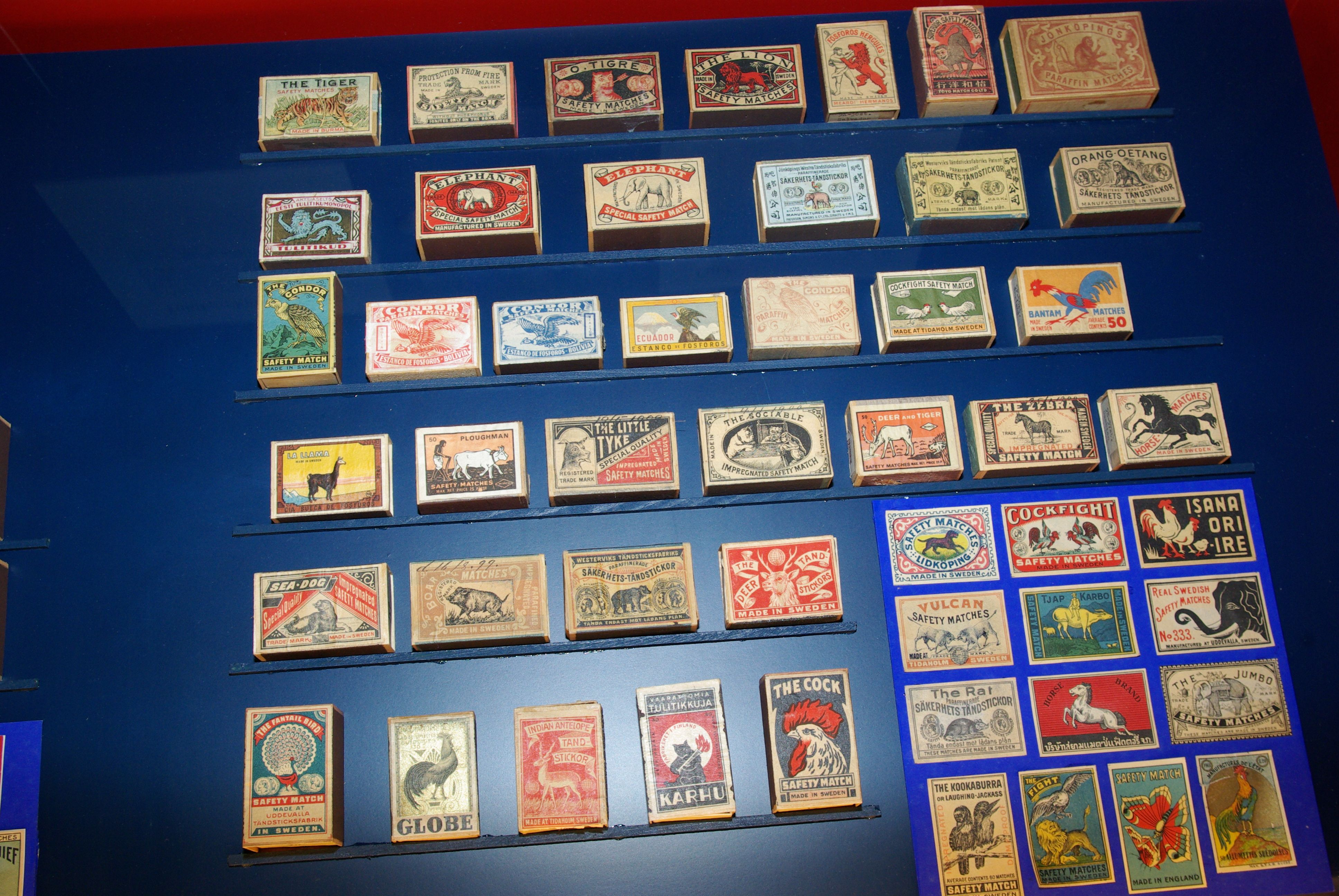 Jönköping, Schweden, das Streichholzmuseum, Beispiele für Streichholzschachteln